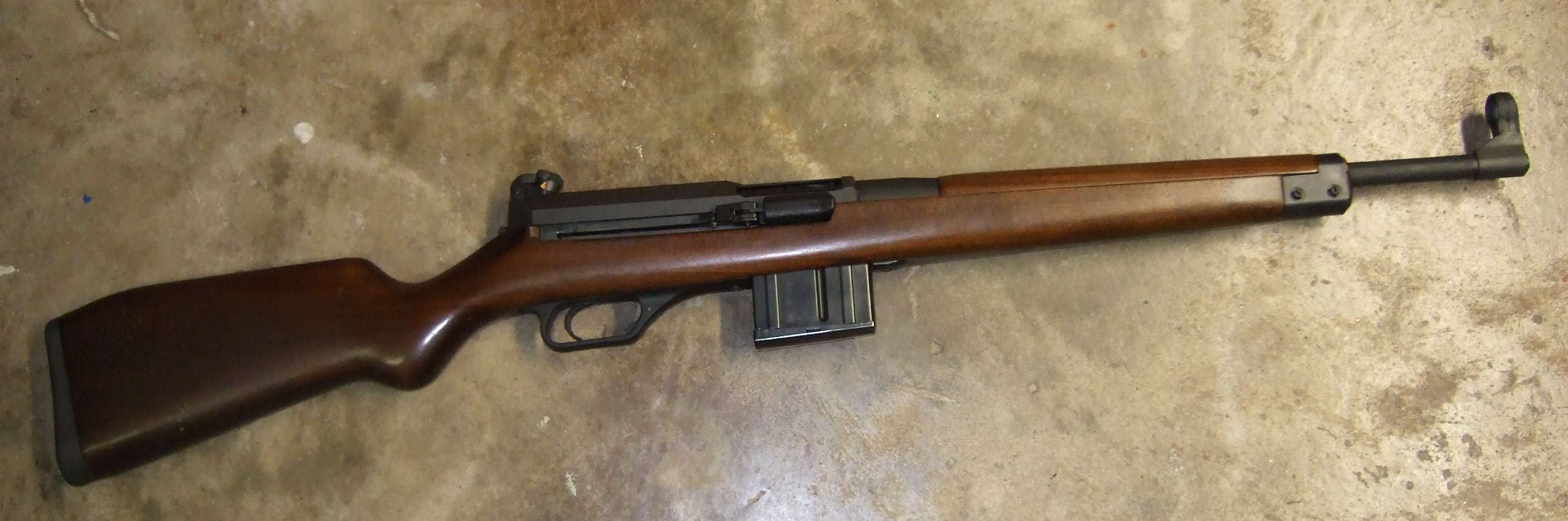 Ansicht Heckler & Koch SL7